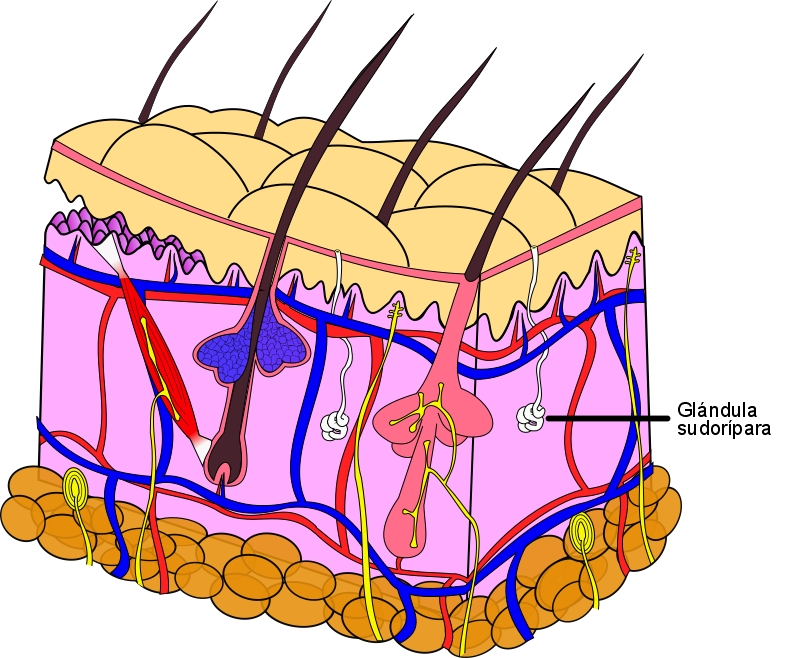 Esquema de la piel en el se indica la situación de una glándula sudorípara.